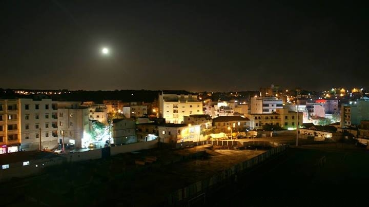 عندما يكتمل القمر سطاوالي الجزائر وسط